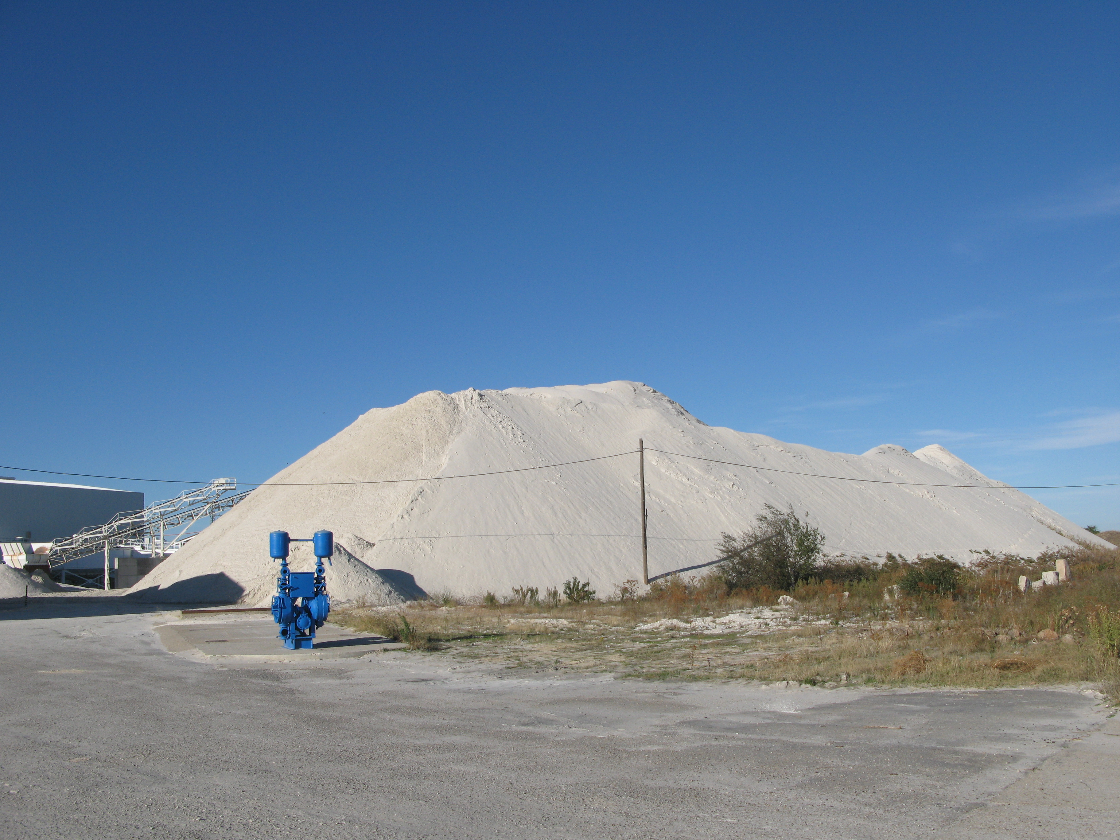 Caolín de Peñausende (provincia de Zamora, España)